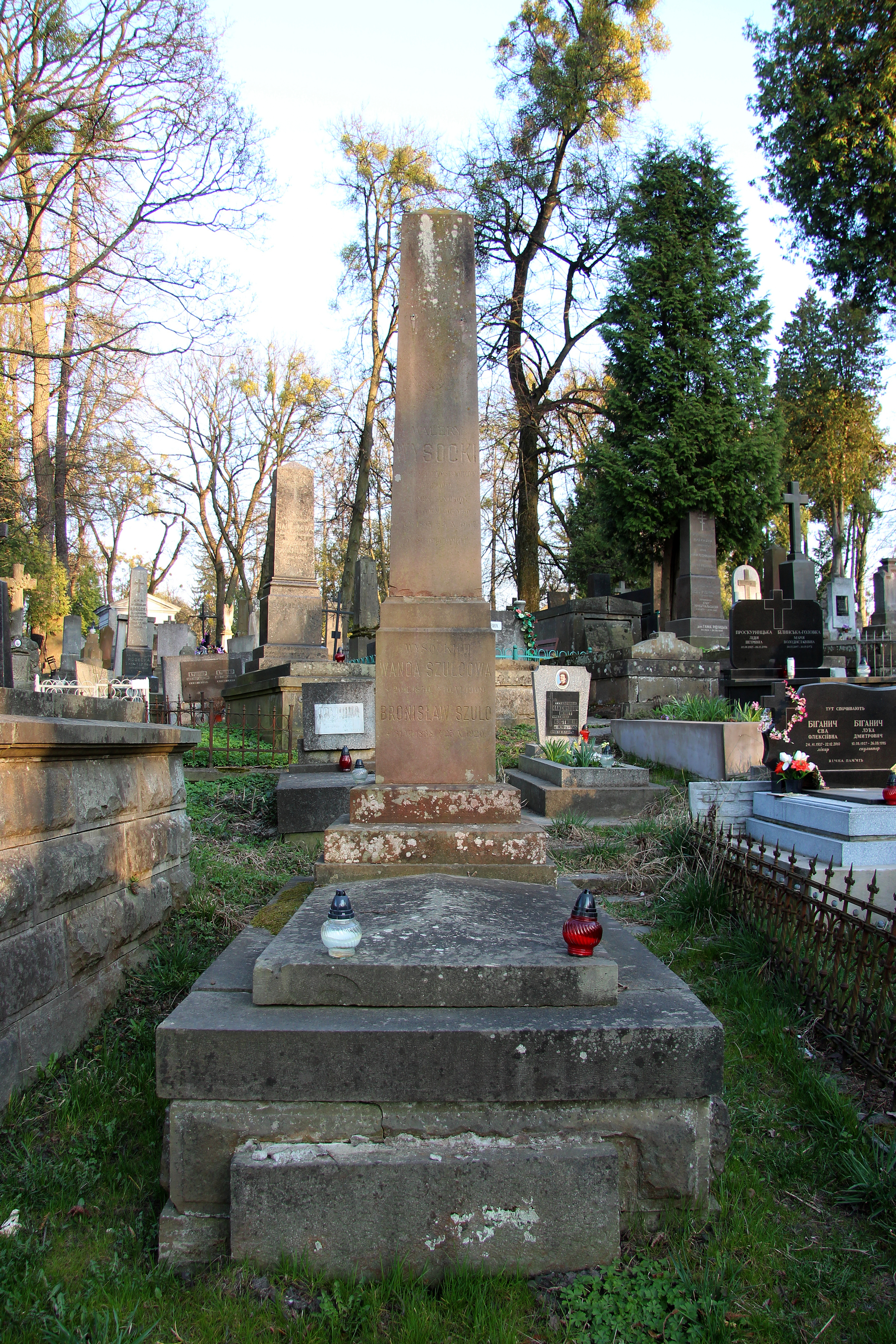 Гробівець Висоцьких. 69 поле , Личаківський цвинтар.